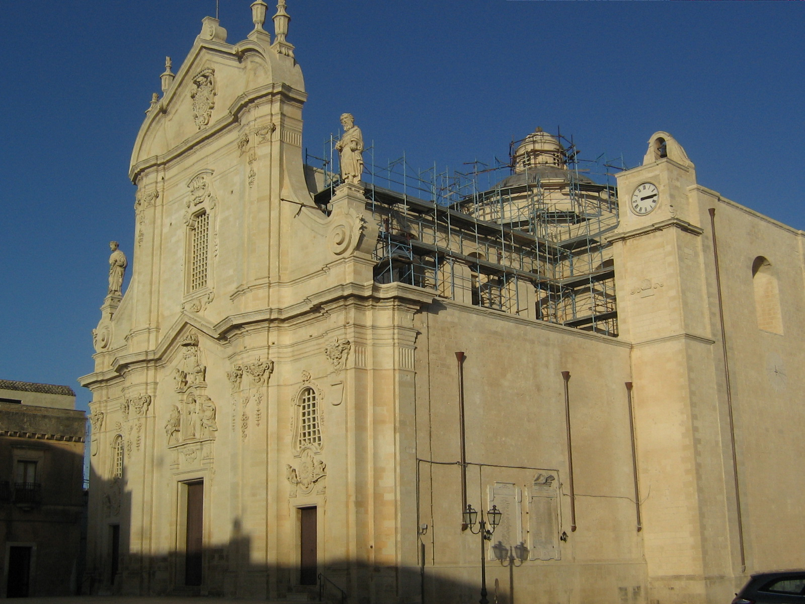 Chiesa madre di Uggiano